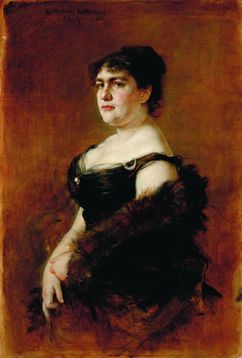 Munkácsy Mihály felesége Cecile Papier